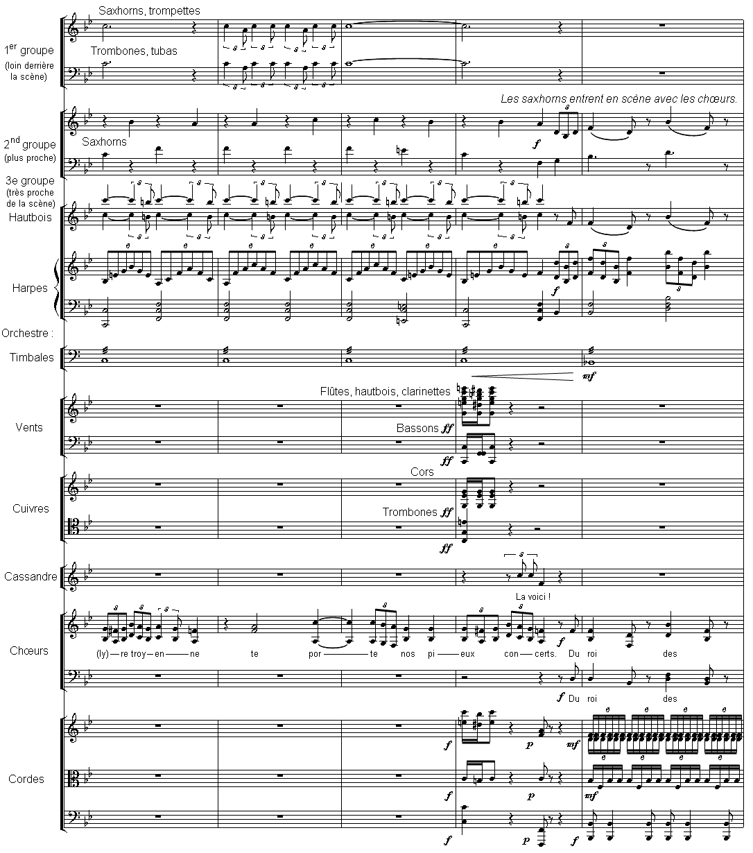 Les Troyens, finale acte I - entrée des saxhorns